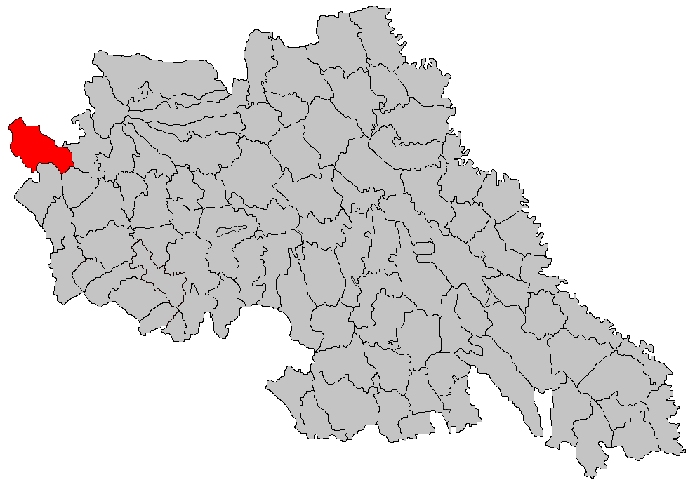 Categorie:Hărţi ale judeţului Iaşi